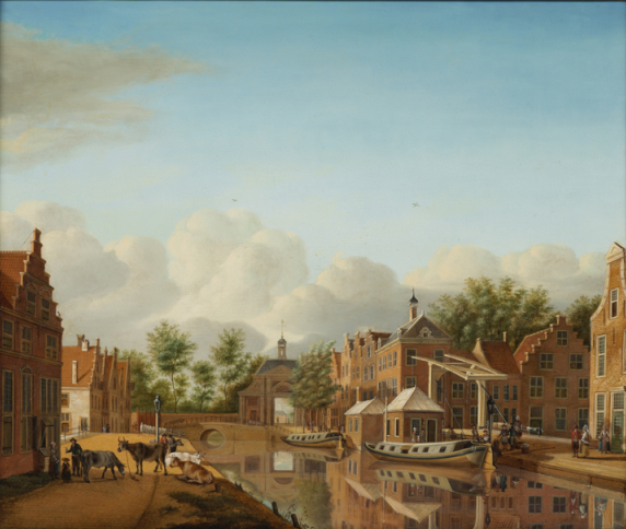 Trekschuiten bij de Marepoort in Leiden, vertrekplaats van de Haarlemse trekschuit die voer tussen Leiden en Haarlem. Gemaakt door Paulus Constantijn la Fargue. Circa 1771. Het Scheepvaartmuseum inventarisnummer 2003.1514